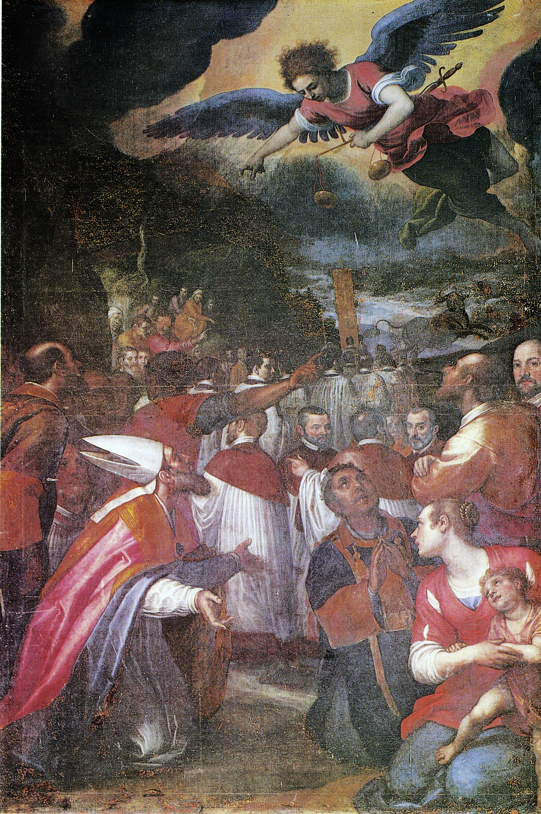 Apparizione dell'arcangelo Michele sul Monte Gargano, olio su tela di Domenico cresti (Il Passignano), Badia a Passignano